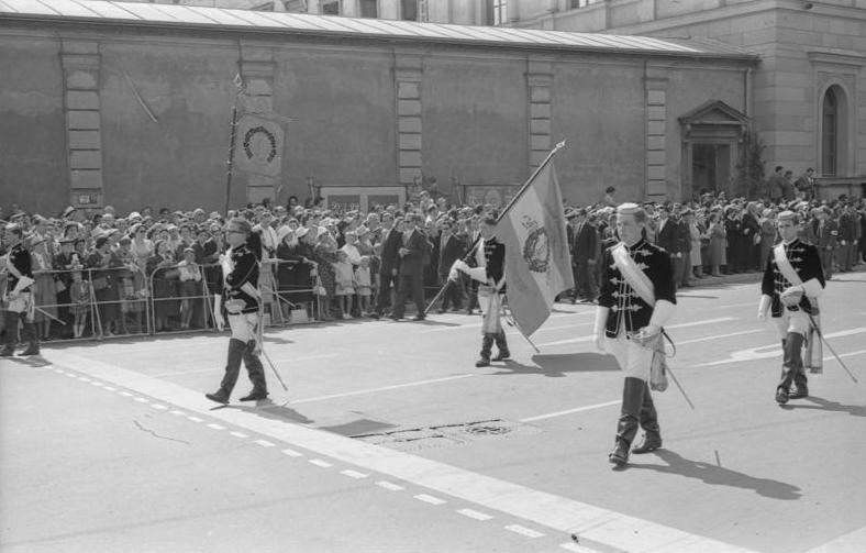 Fronleichnamsprozession in München